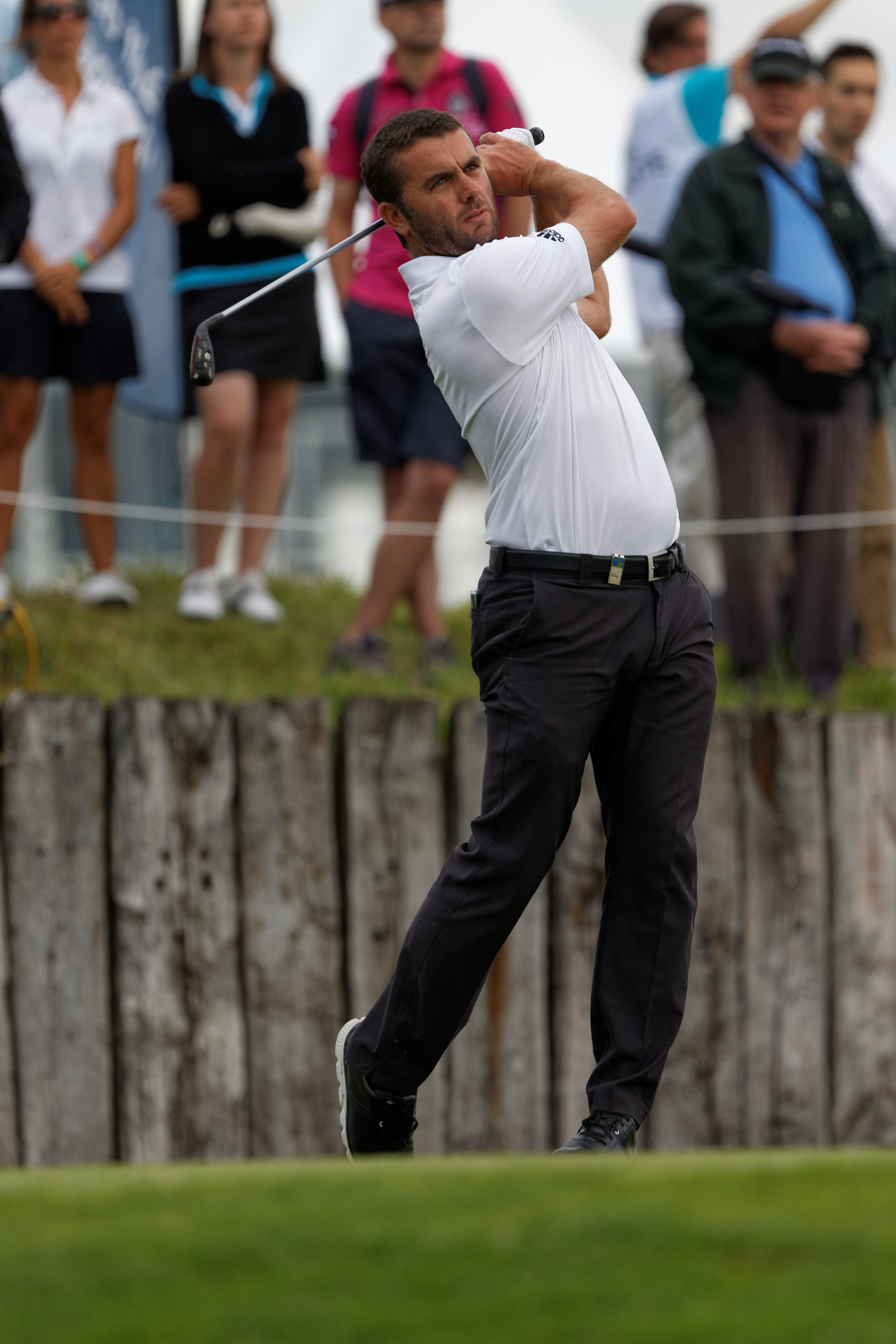 Andrew Mc Arthur lors du second tour de l'Open de France 2014